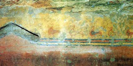 Anonyme, fresque de la tombe des Canards (Tomba delle anatre), près de Véies, Italie.